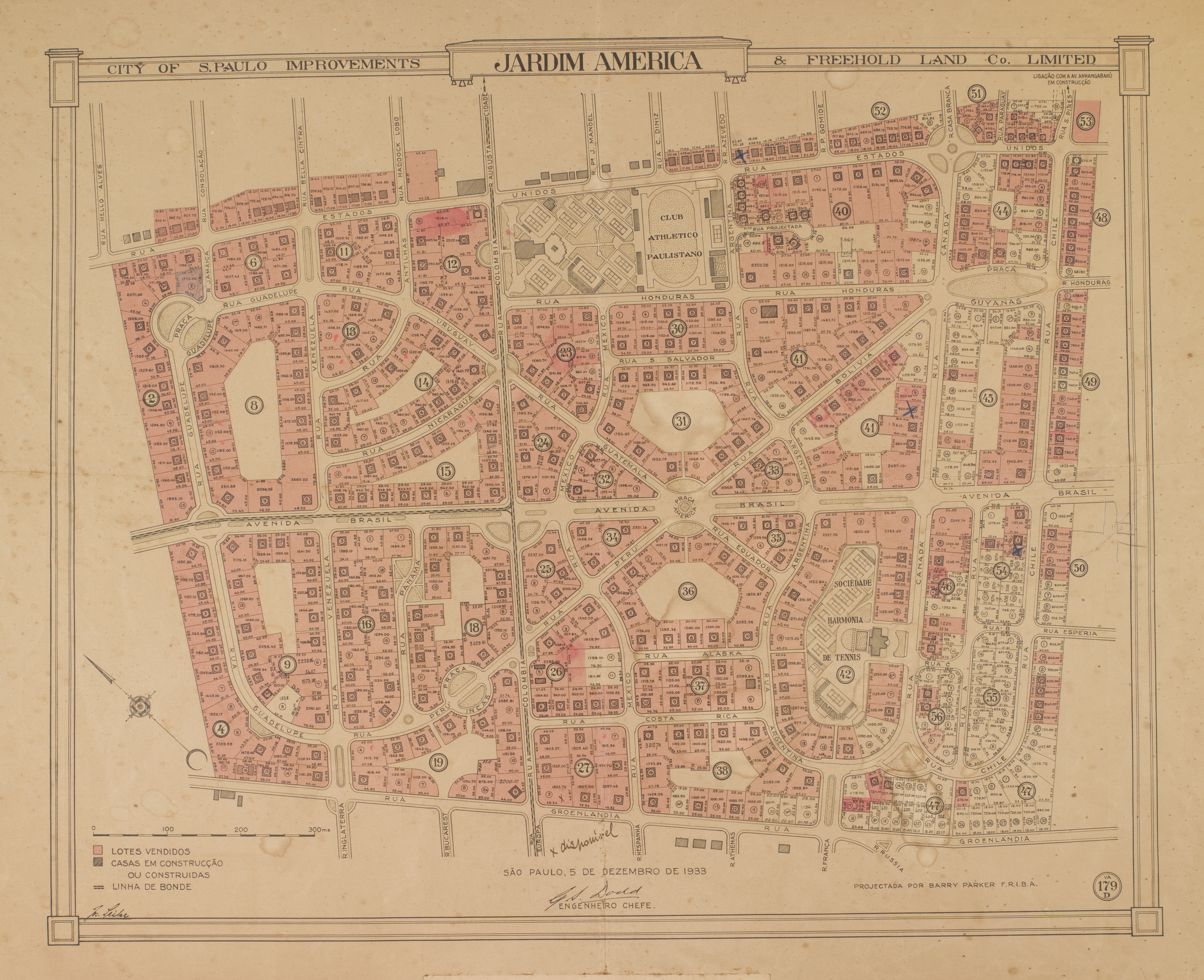 Obra que integra o acervo do Museu Paulista da USP. Coleção João Baptista de Campos Aguirra - Ref. Agente: City of São Paulo Improvements & Freehold Land Company Ltd. Projectada por Barry Parker F.R.I.B.A.